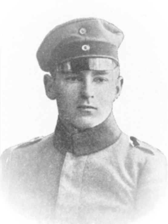 Description